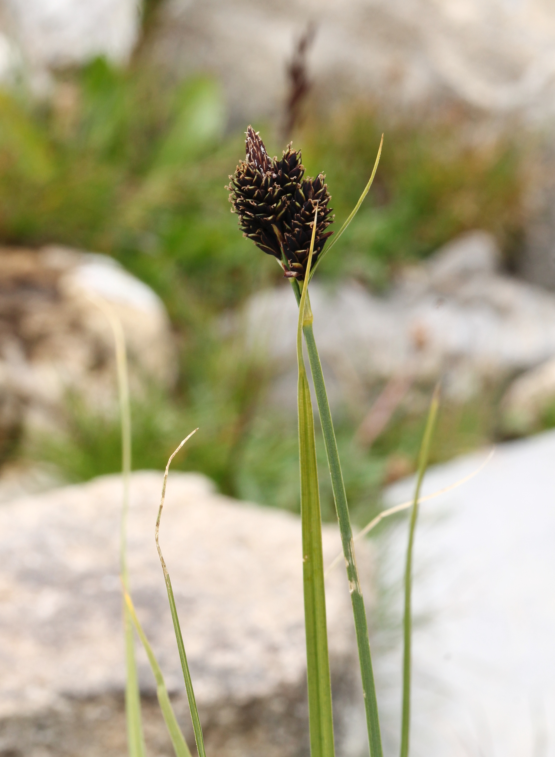 Laîche à petites fleurs